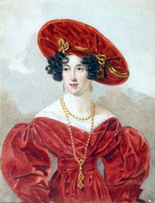 Баронесса Елизавета Васильевна Мейендорф (1802—1872), ур. баронесса Гоггер, жена барона А. К. Мейендорфа